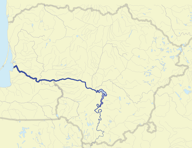 River Nemunas